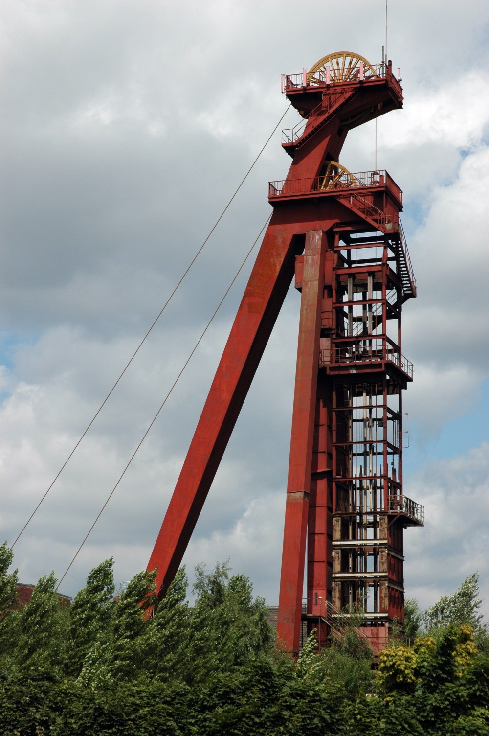 Förderturm der Schachtanlage Grillo des Bergwerks Monopol, Kamen